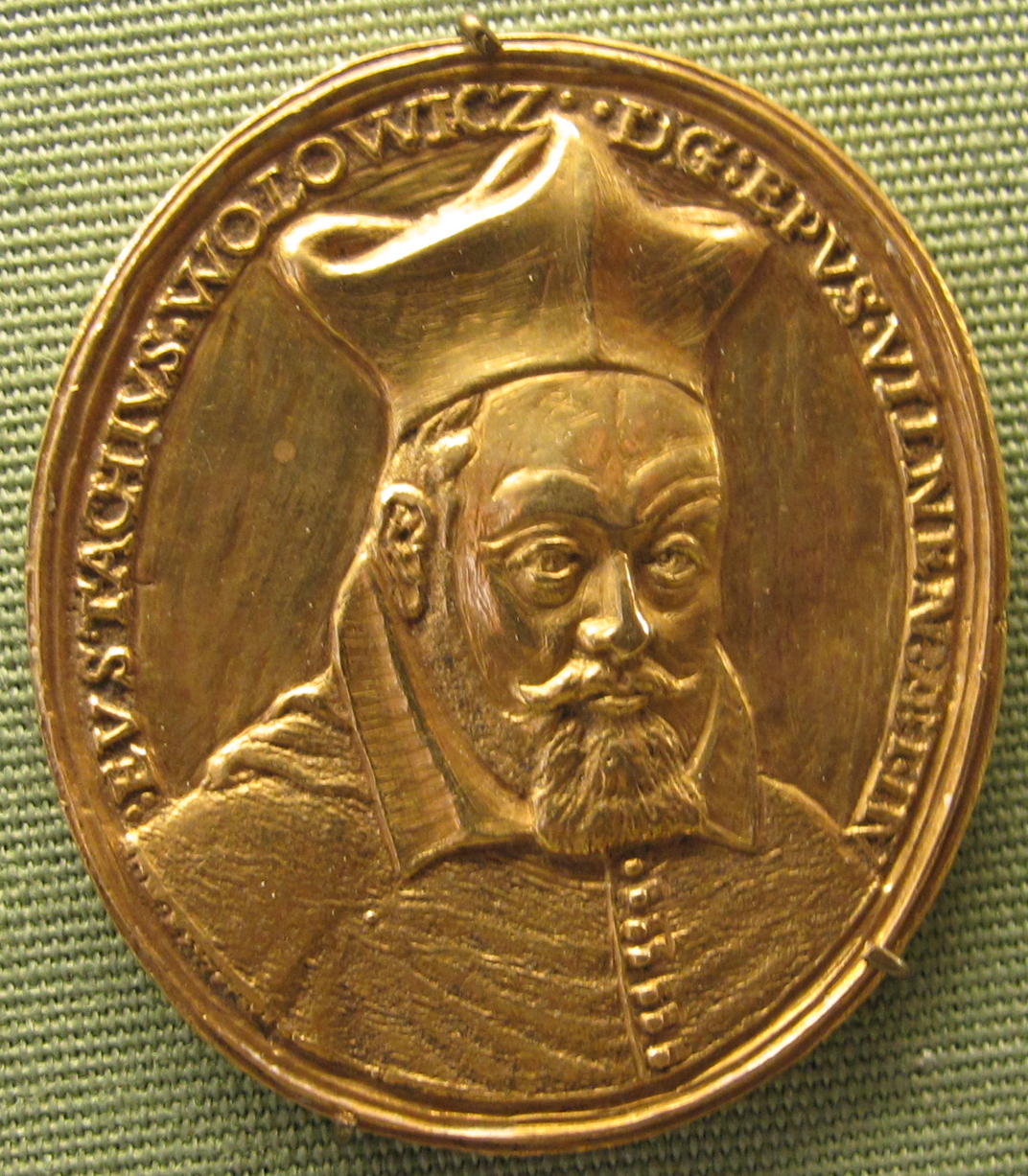 Eustachius Wollowicz, vescovo di Wilna, oro, 1626